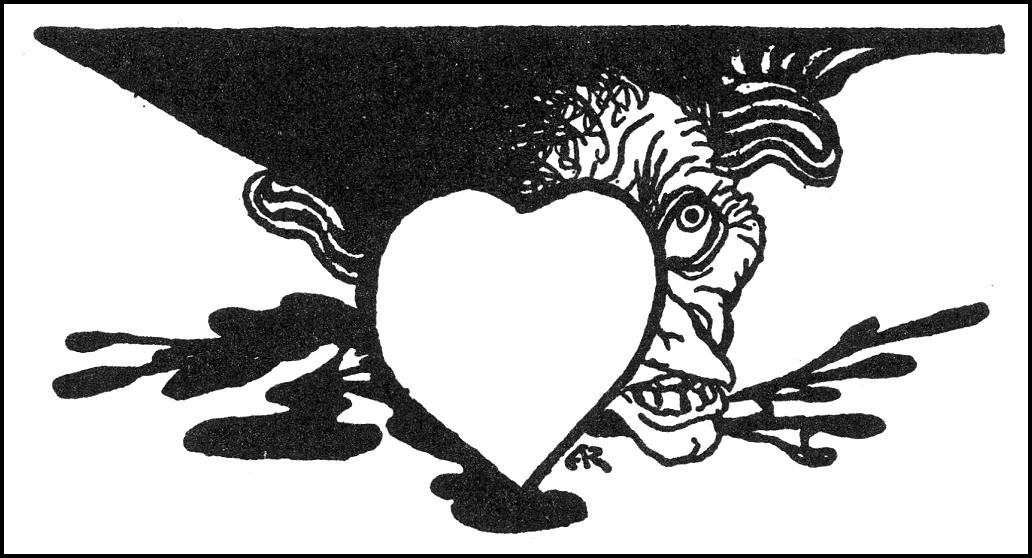 Иллюстрация Артура Рэкхема из книги "Poe's Tales of Mystery and Imagination" к рассказу Эдгара По "Сердце-обличитель"